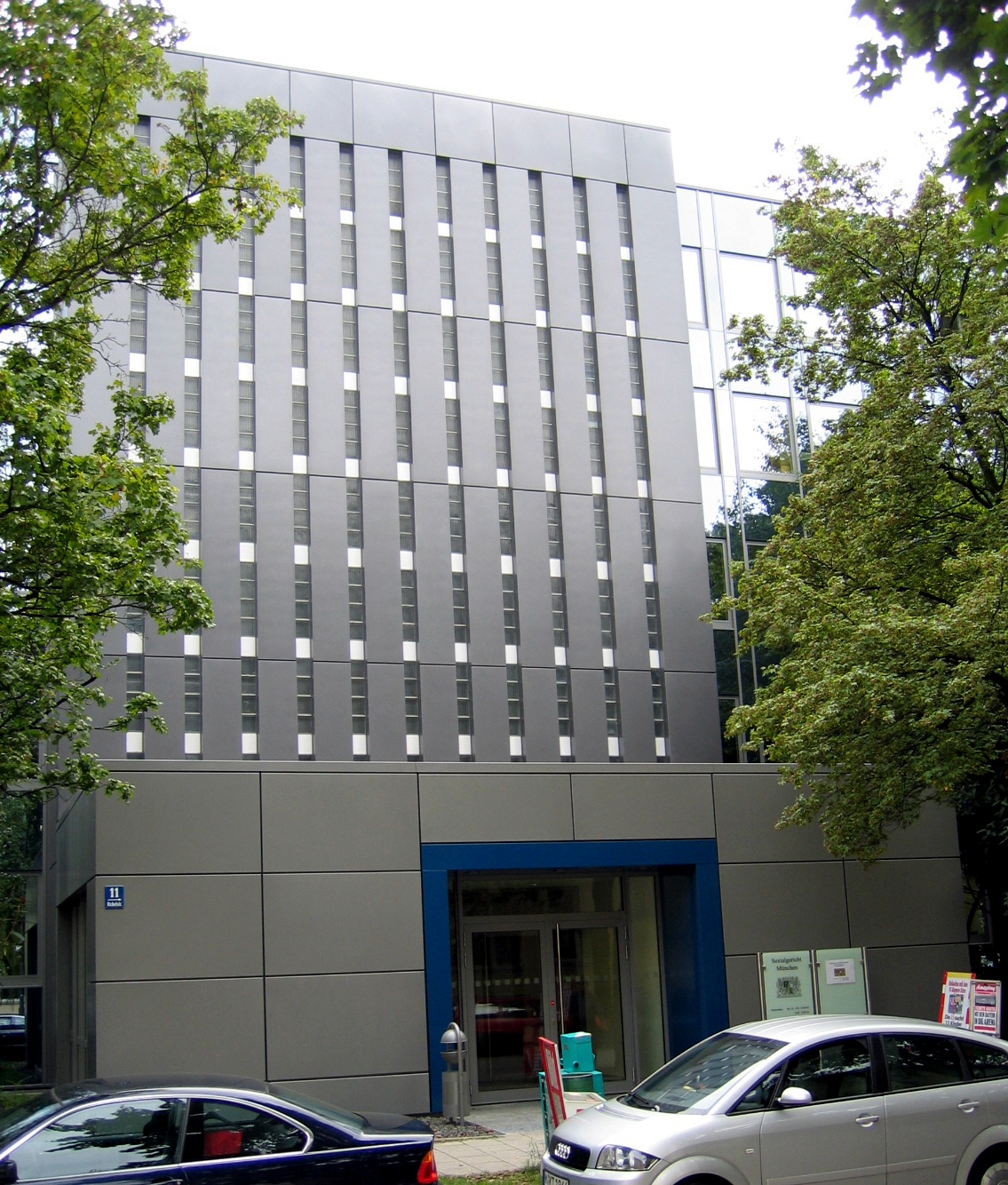 Description: Gebäude des Sozialgerichtes, Richelstraße 11 in München (Germany) Source: selbst fotografiert Date: 14. Sept. 2005 Author: Bubo